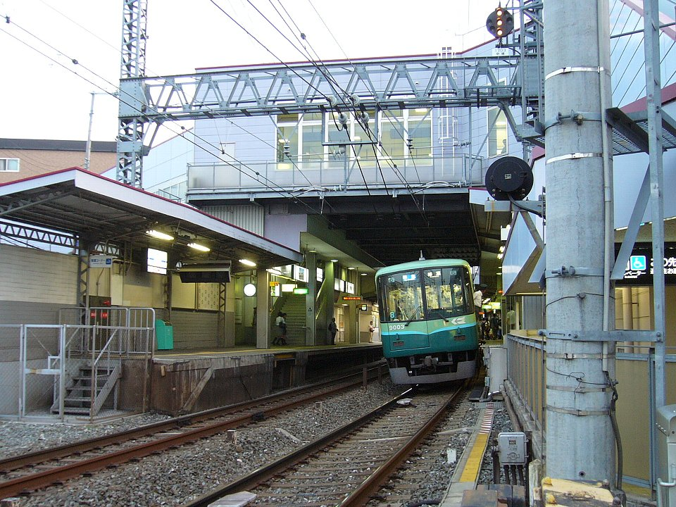 光善寺駅 駅北方から構内を望む 2006年9月29日 Bakkai撮影